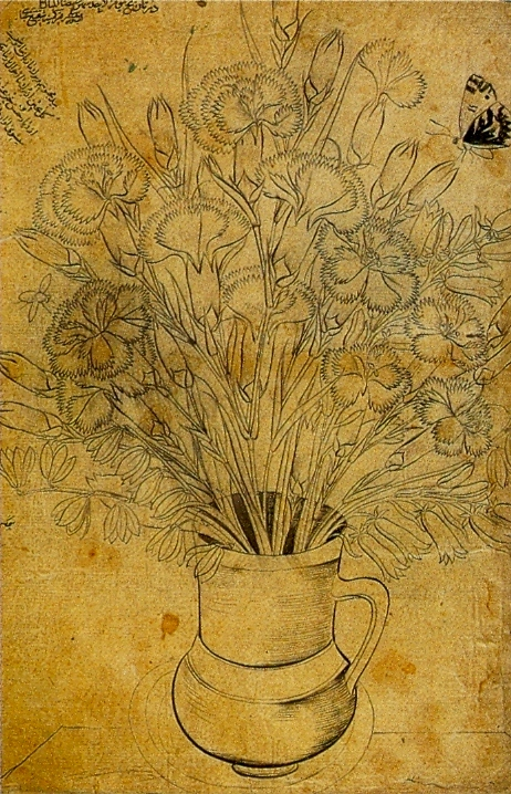 Цветы в кувшине. Подписан.1672г.Брит.муз